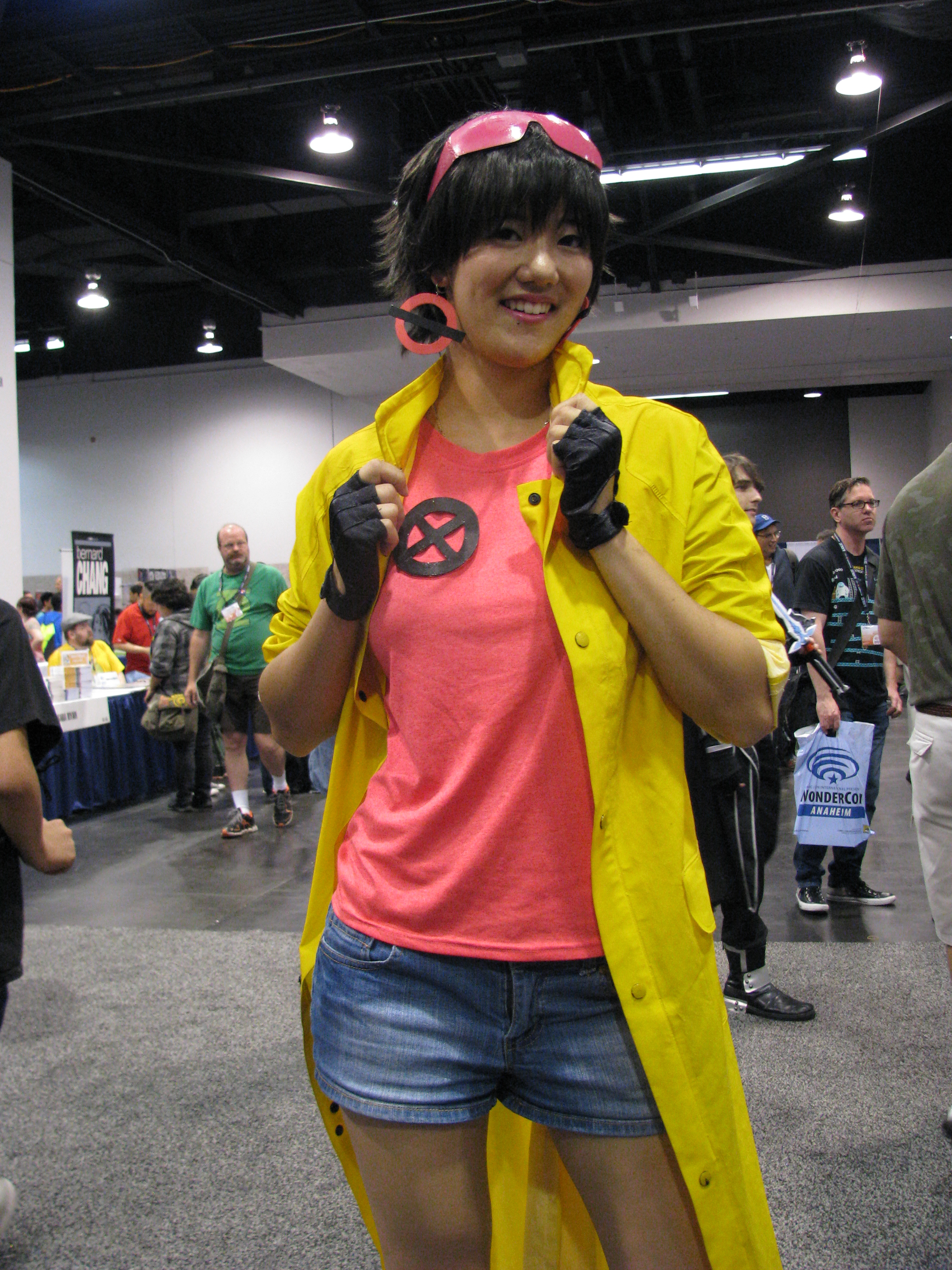 WonderCon 2014 - Jubilee